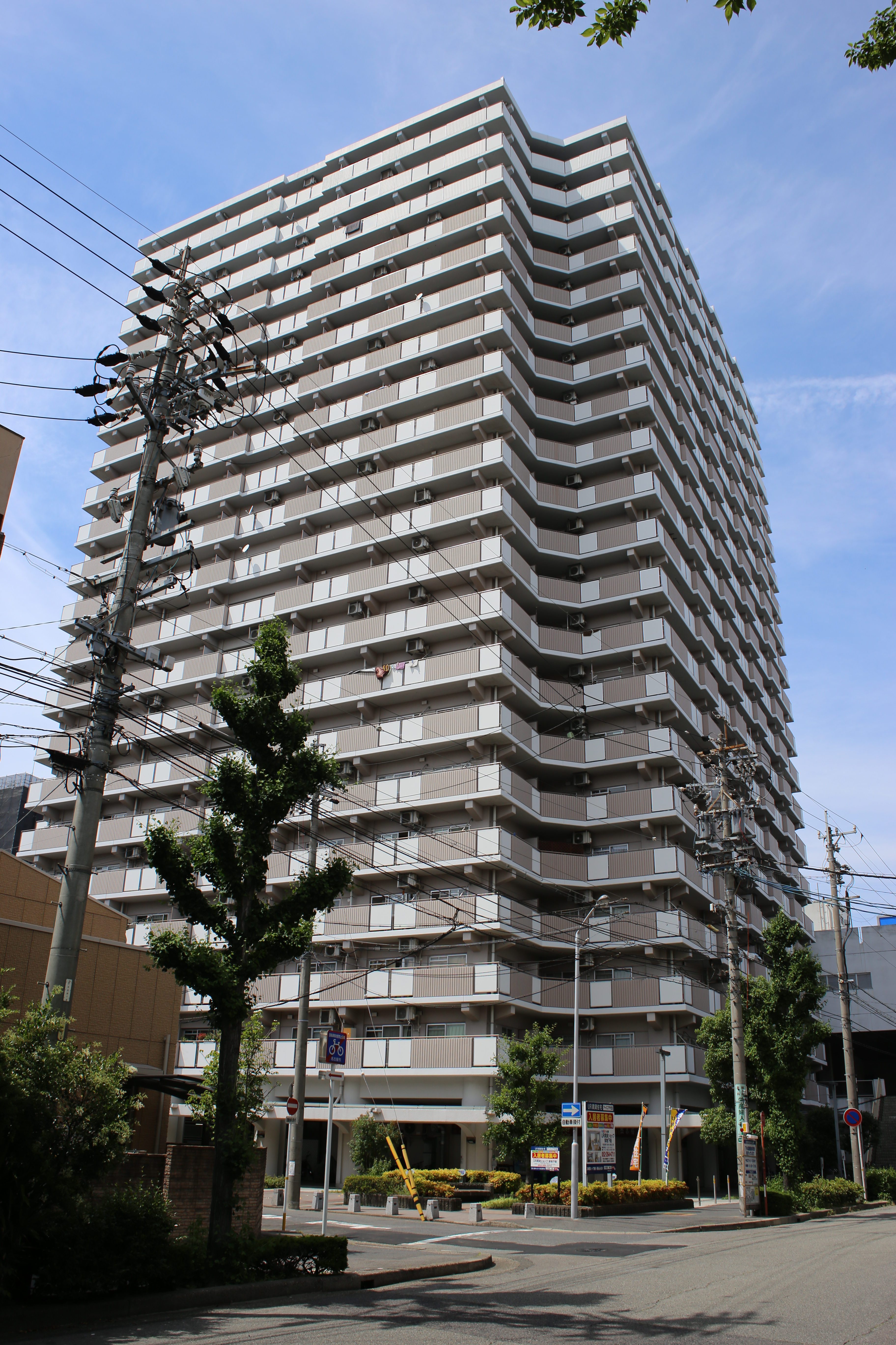 名古屋市中区千代田五丁目のアーバニア千代田を東側公道南側より撮影